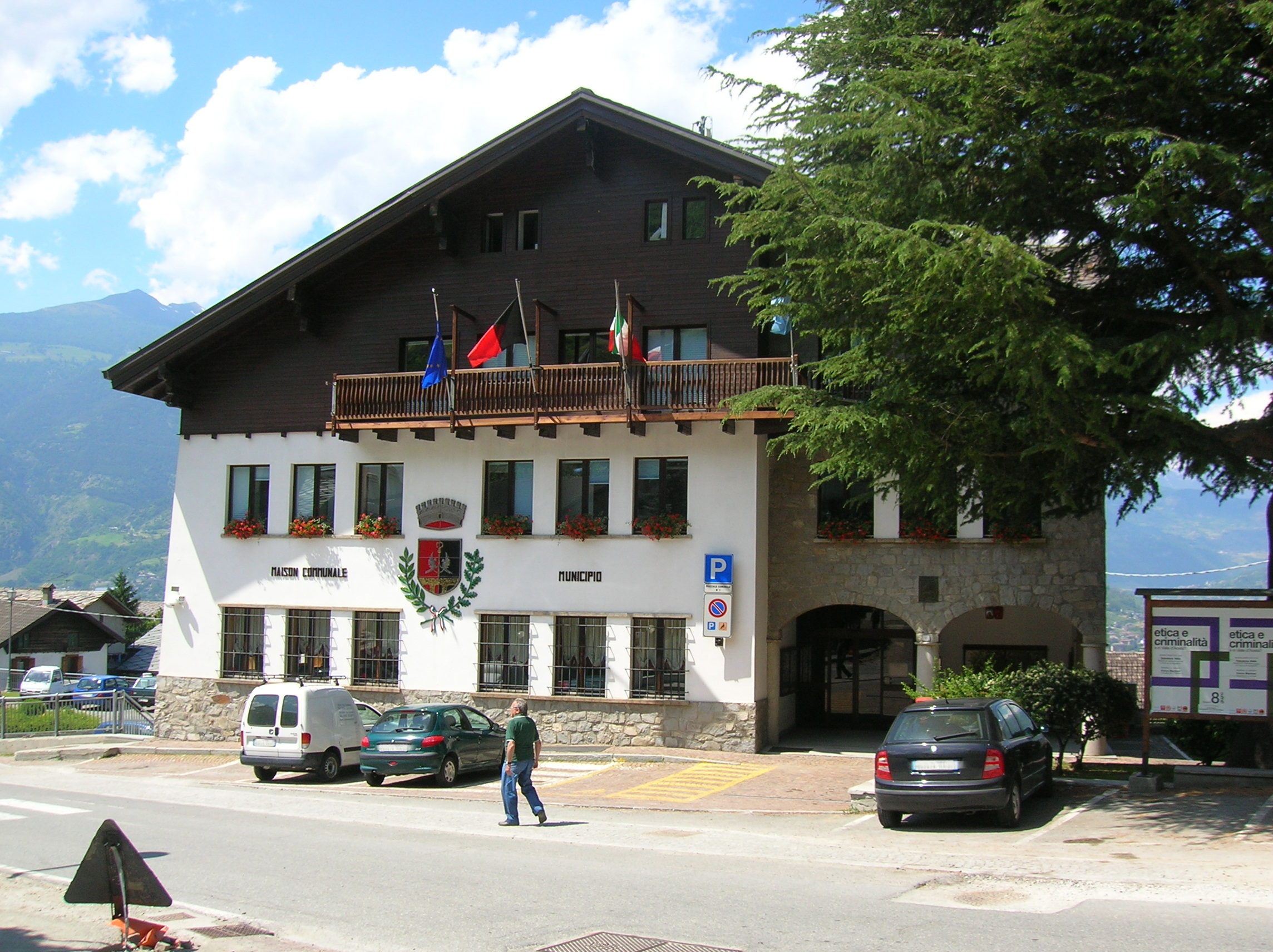 Municipio di Charvensod, Valle d'Aosta, Italia.